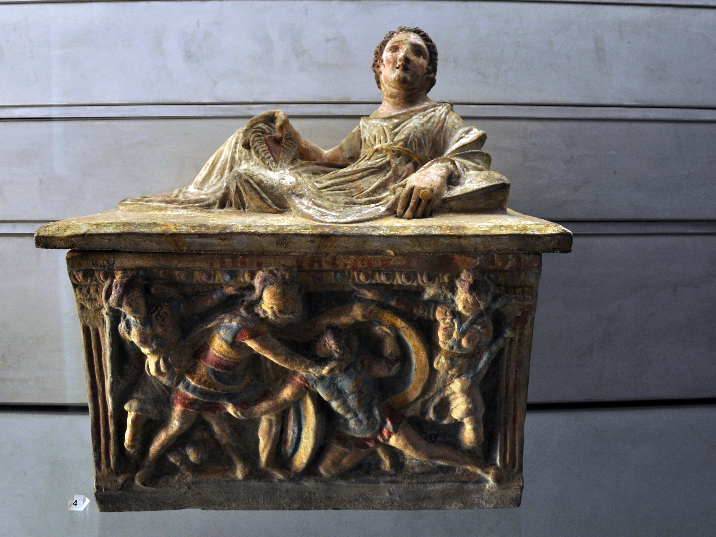 Urne funéraire étrusque avec le combat d'Etéocle et de Polynice, Chuisi, 2ème siècle - JC. Musée des Beaux-Arts de Lyon.